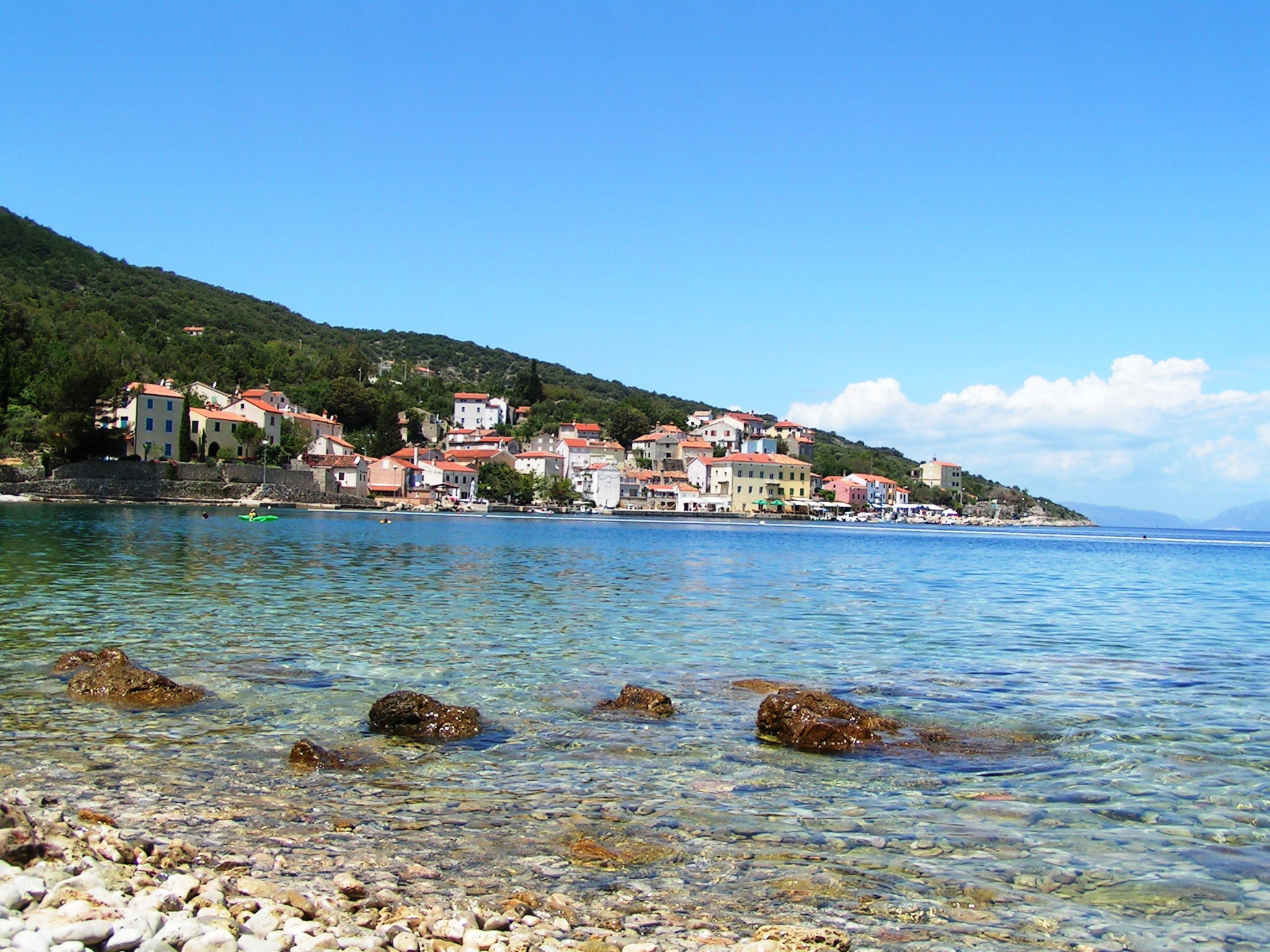 Valun, Cres, Croatia